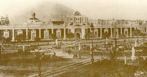 Palacio de Gobierno del Perú reconstruido luego del incendio ocurrido, a fines de 1884, durante el gobierno del presidente Miguel Iglesias. A la vista la Plaza Mayor de Lima después de la reconstrucción efectuada durante el gobierno de Nicolás de Piérola. Fotografía de fines del siglo XIX.